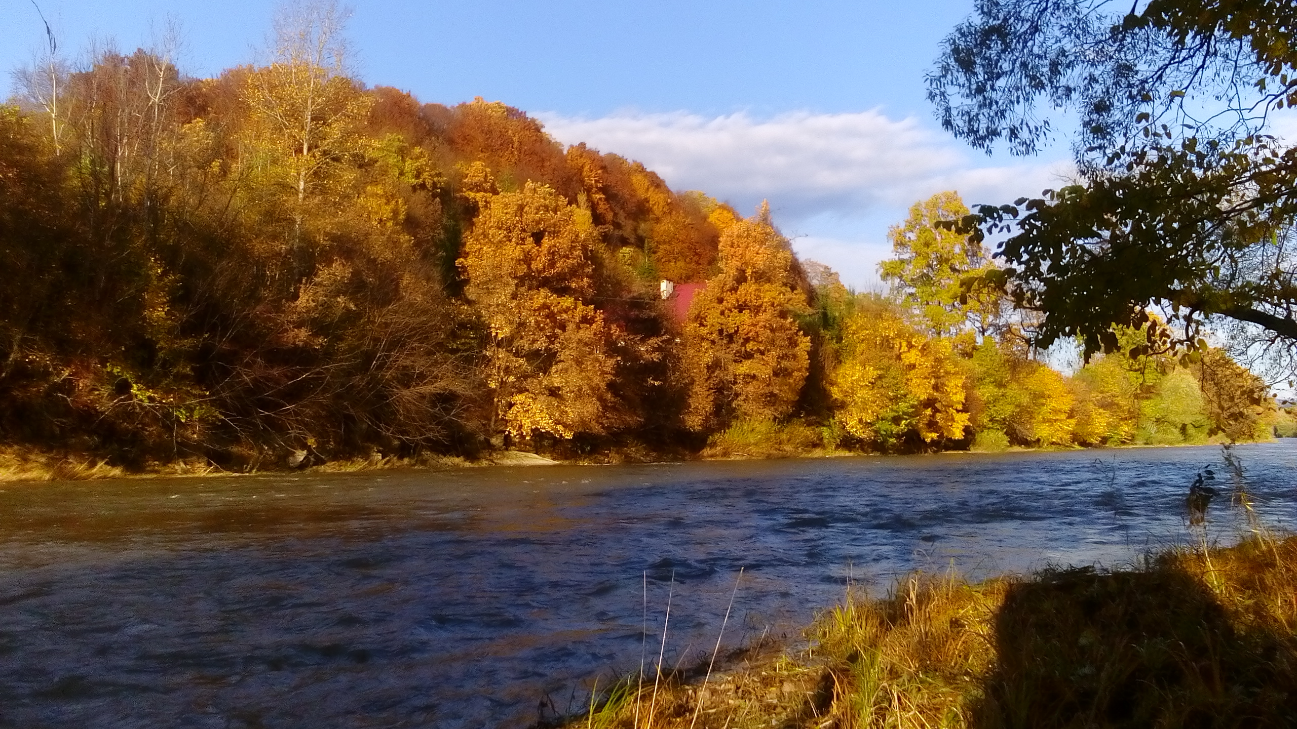 Osława w Czaszynie Jesienią